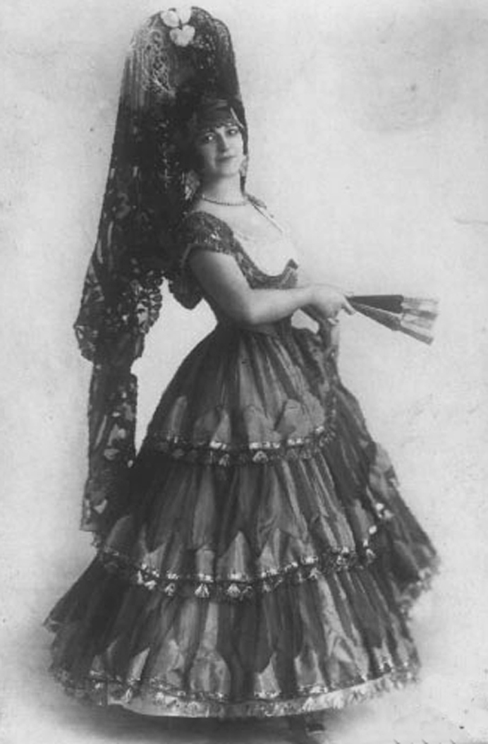 Maria Kuznetsova in Spanish Costume